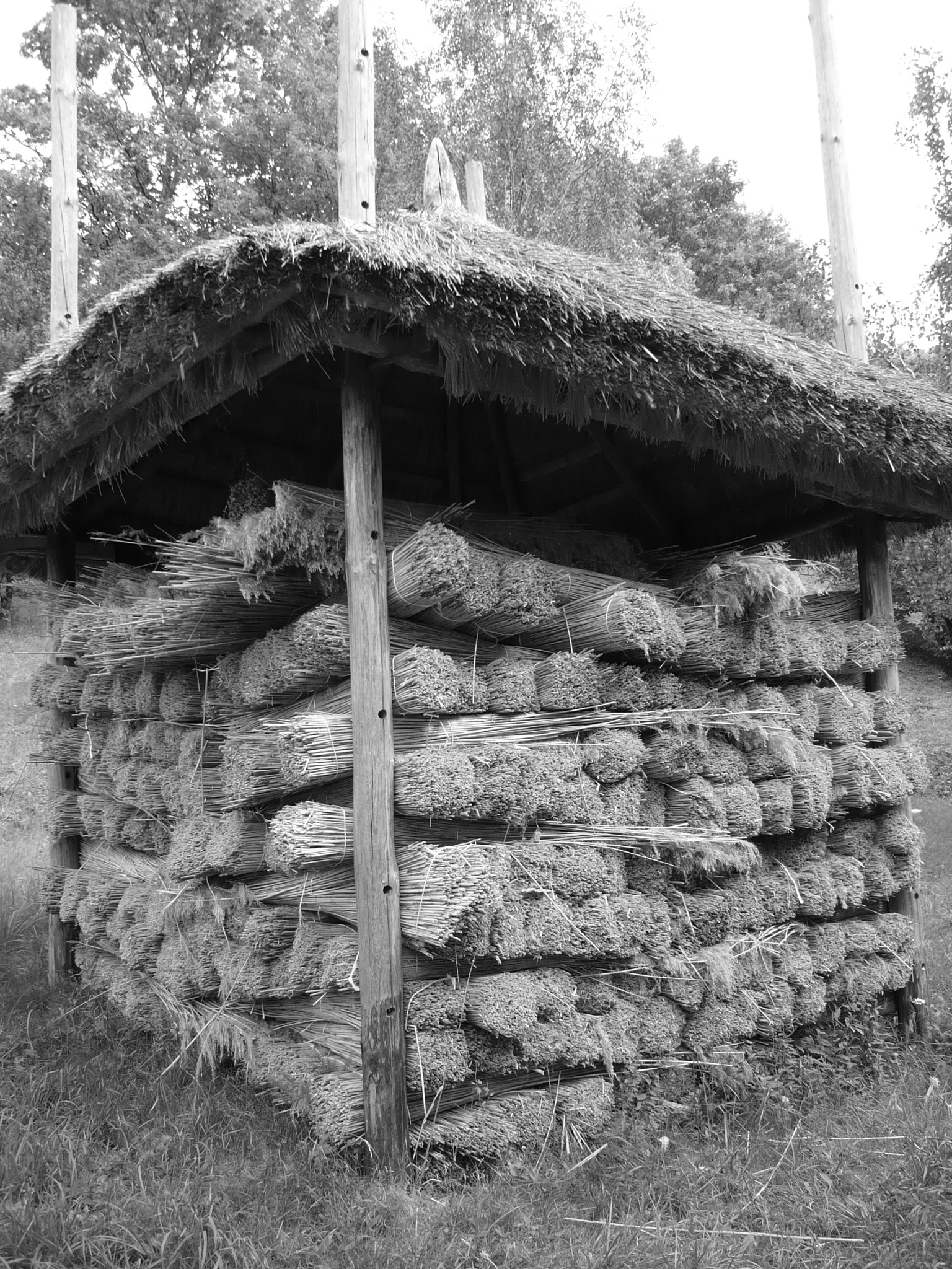 Spichlerz na słomę